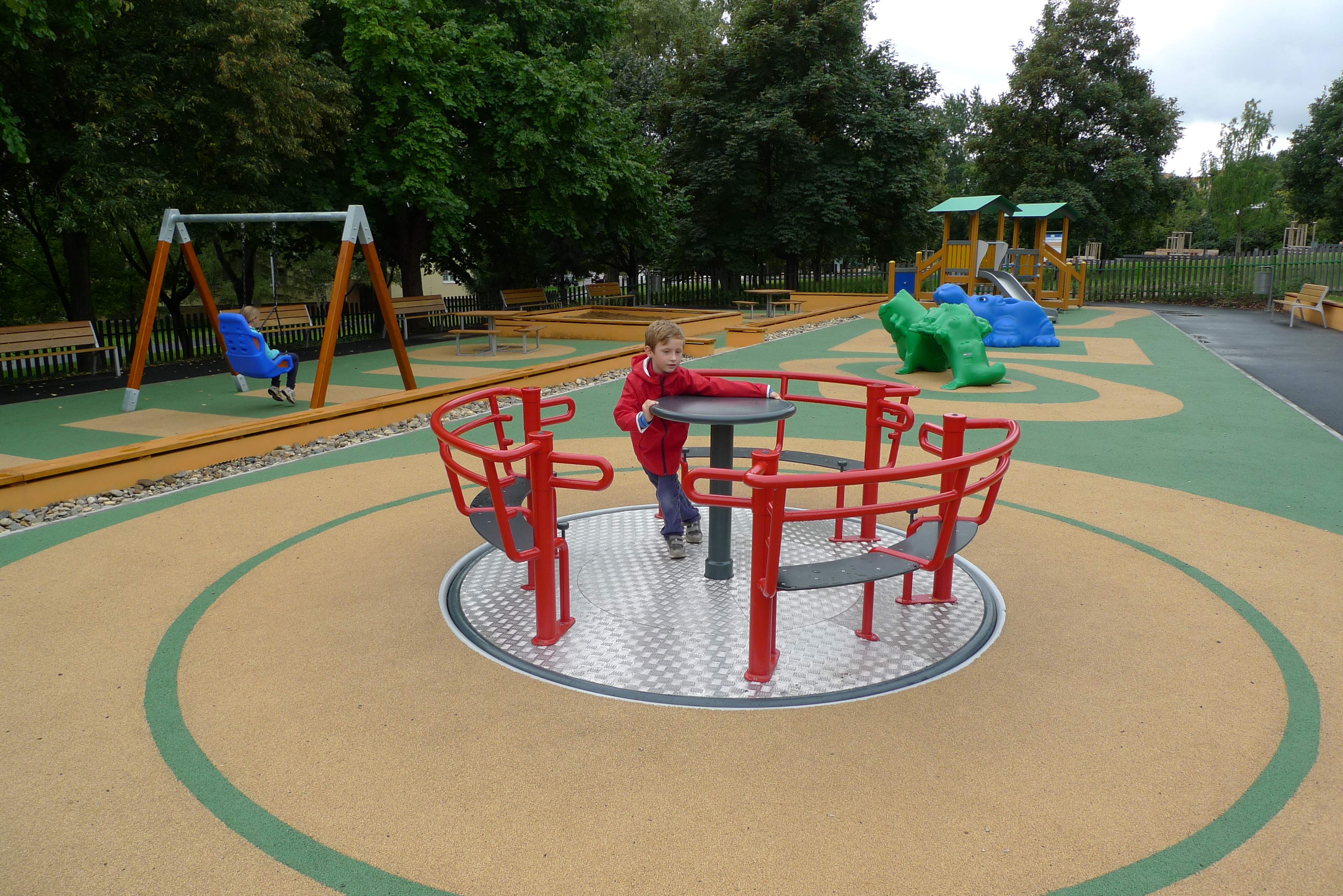 Malešický park v Praze 10 - bezbariérový kolotoč